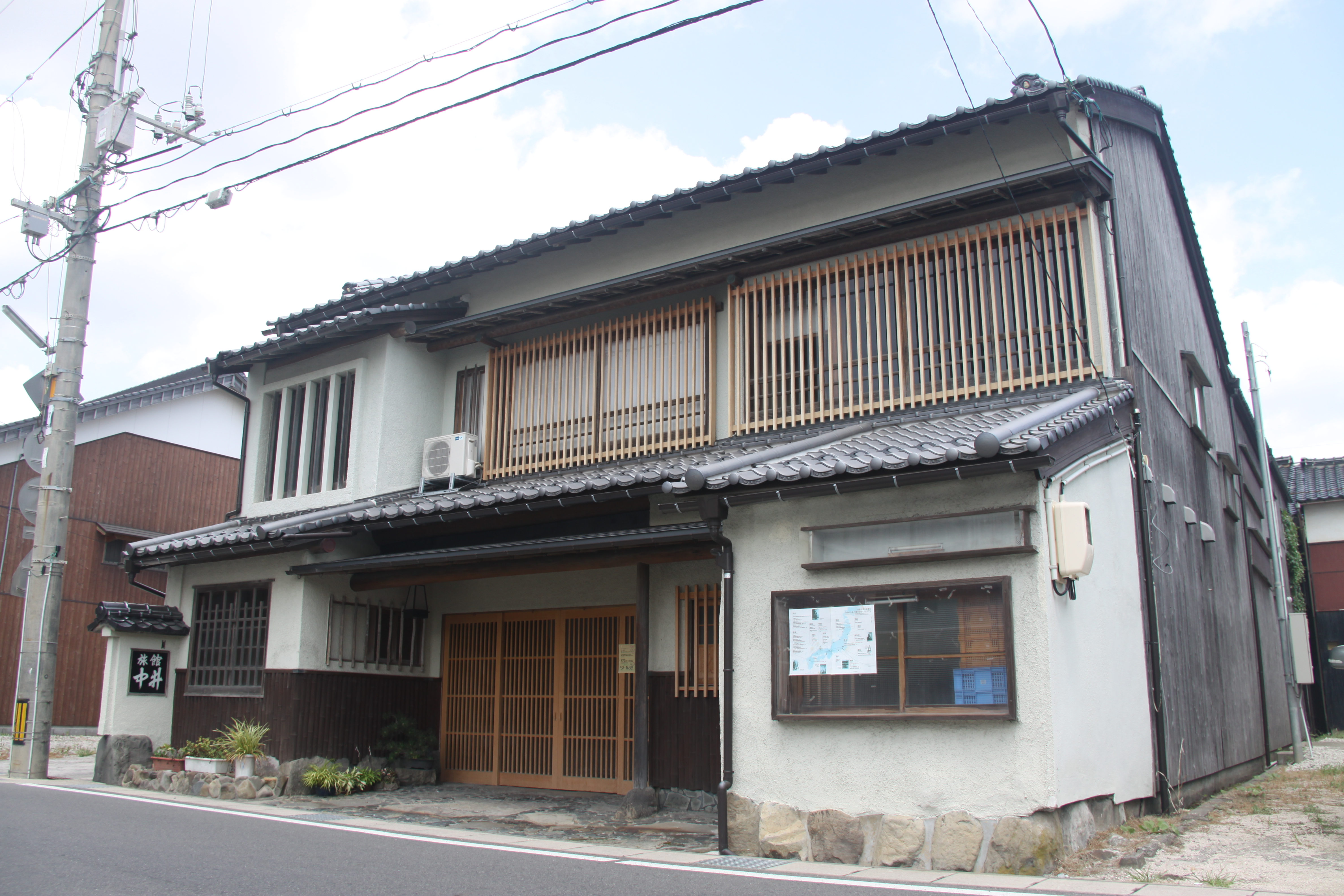 鳥取県東伯郡琴浦町（旧・八橋）にある旧・中井旅館。